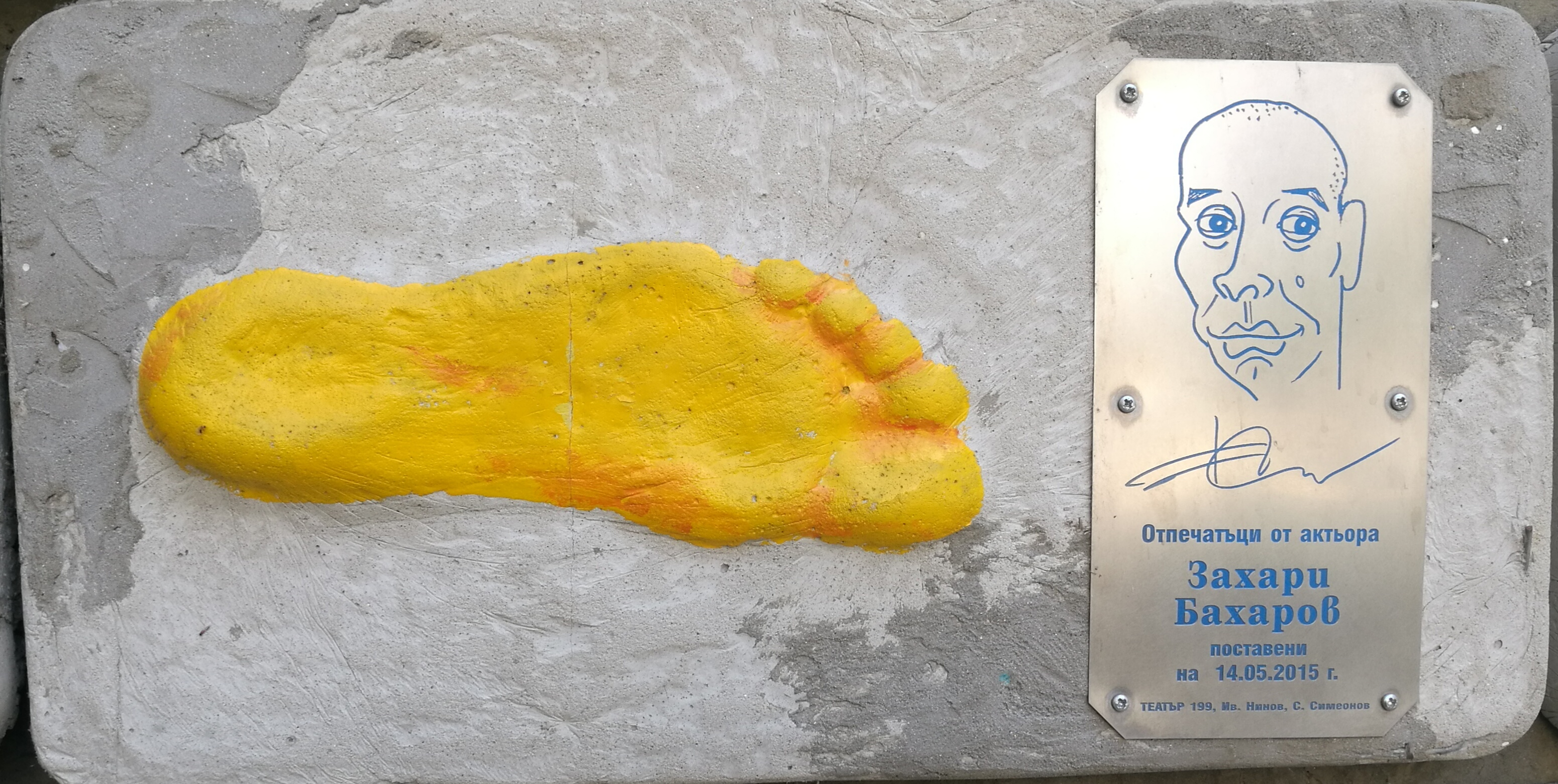 Стената на славата пред Театър 199 - пано с отпечатъци, послание и шарж на Захари Бахаров.